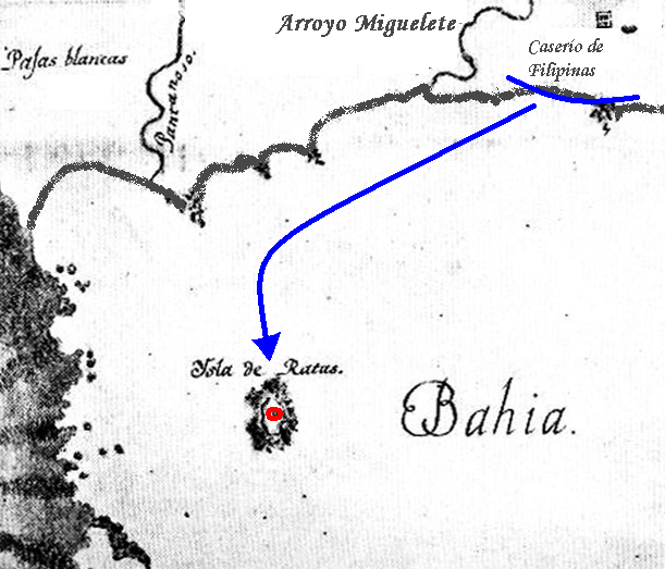 Plano de Montevideo y de las posiciones de la línea sitiadora. Modificación referente al Asalto a la Isla de las Ratas.